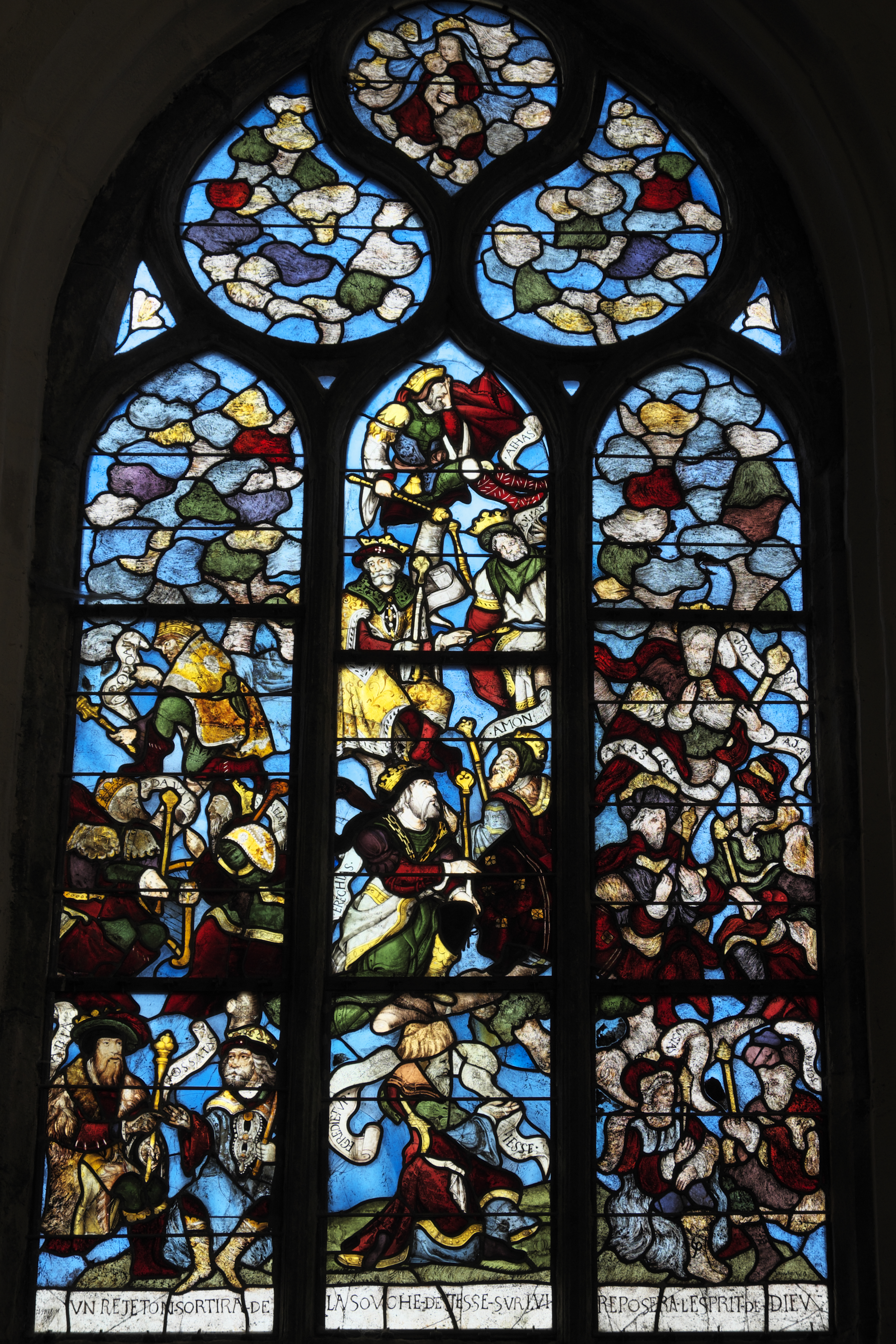 Katholische Pfarrkirche Saint-Salomon in La Martyre im Département Finistère (Region Bretagne/Frankreich), Bleiglasfenster (baie 5) mit Fragmenten aus dem 16. Jahrhundert; Darstellung: Wurzel Jesse